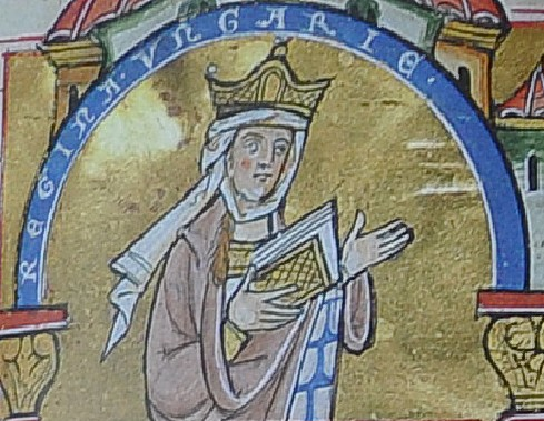 Gertruda Meranská, uherská královna